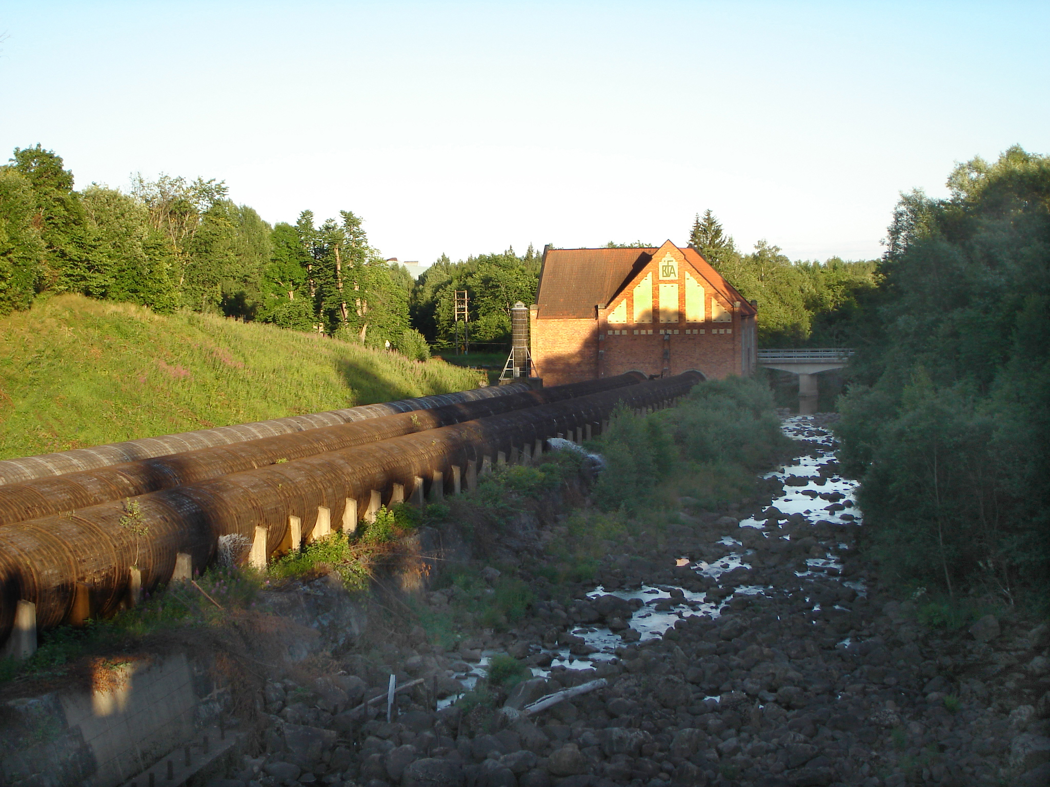 Krafstationen vid Semlaområdet